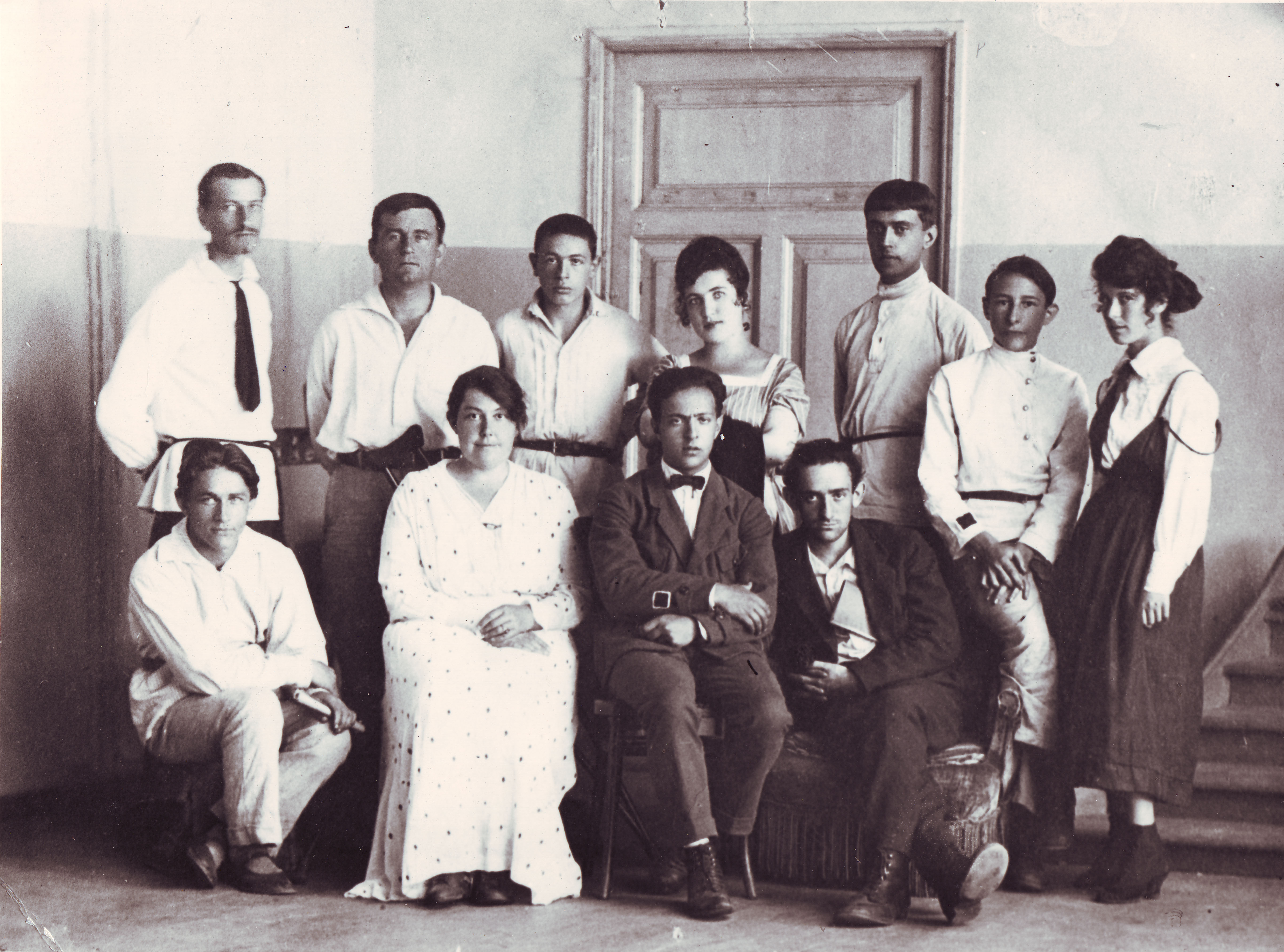 УНОВИС. Июль 1922. Витебск